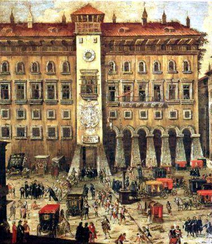 Il Tribunale della Vicaria, attribuito a Carlo Coppola oppure ad Ascanio Luciani; prima metà del XVII secolo; olio su tela, cm 143 x 130; proveniente dal Banco di Napoli (dono), oggi al Museo di San Martino, Napoli.